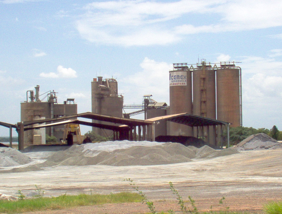 Ferrominera, estado Bolívar - Venezuela 2003